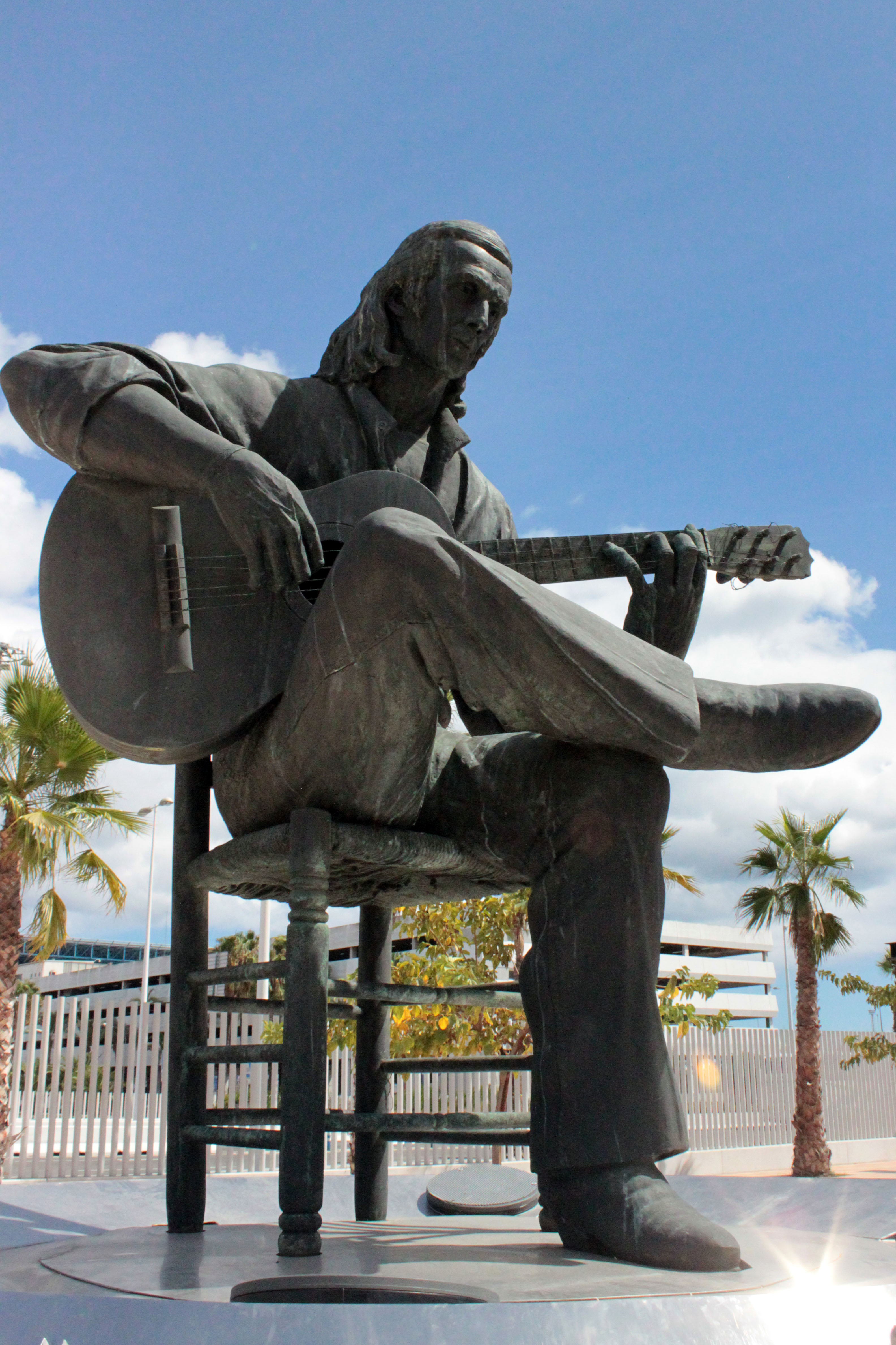 Escultura del gitarrista Paco de Lucía, obra realizada en bronce por el escultor Nacho Falgueras en 1994. El monumento fue emplazado junto al acceso central del Puerto de Algeciras, renombrado como Acceso Central Paco de Lucía, en junio de 2016 tras haber sido trasladado en dos ocasiones. Algeciras, Andalucía, España.